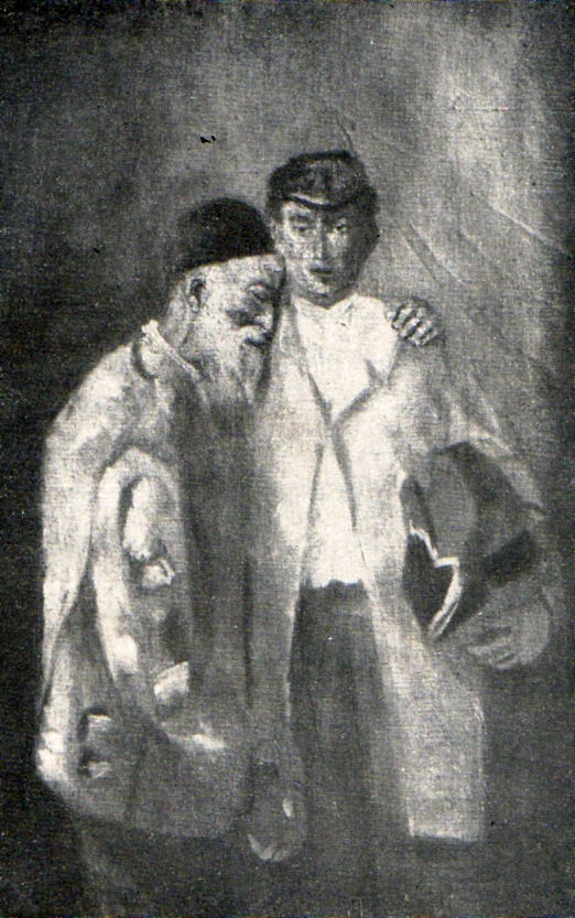 Emigrantul